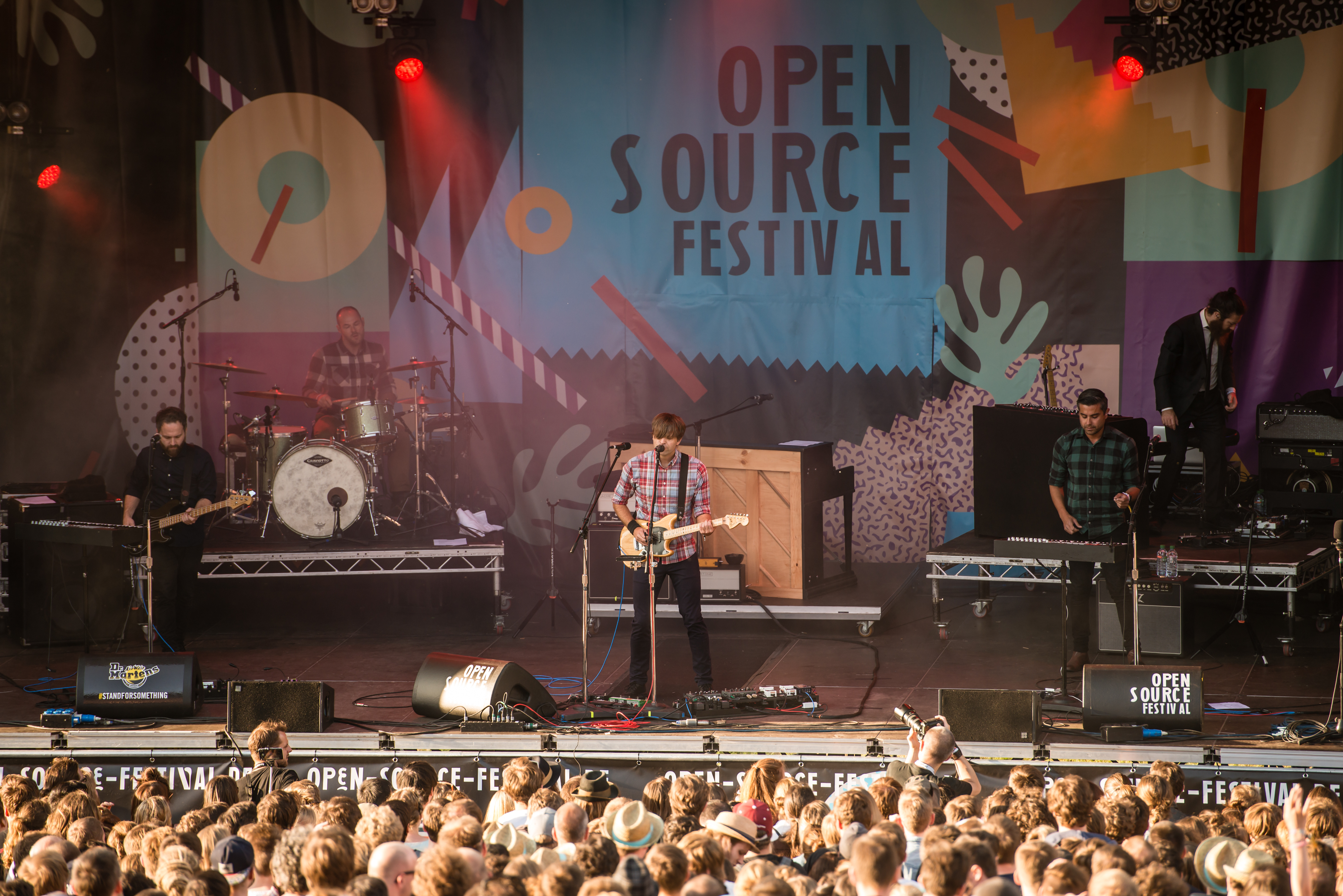 'Open Source Festival 2015; Düsseldorf Galopprennbahn': 'Death Cab for Cutie'